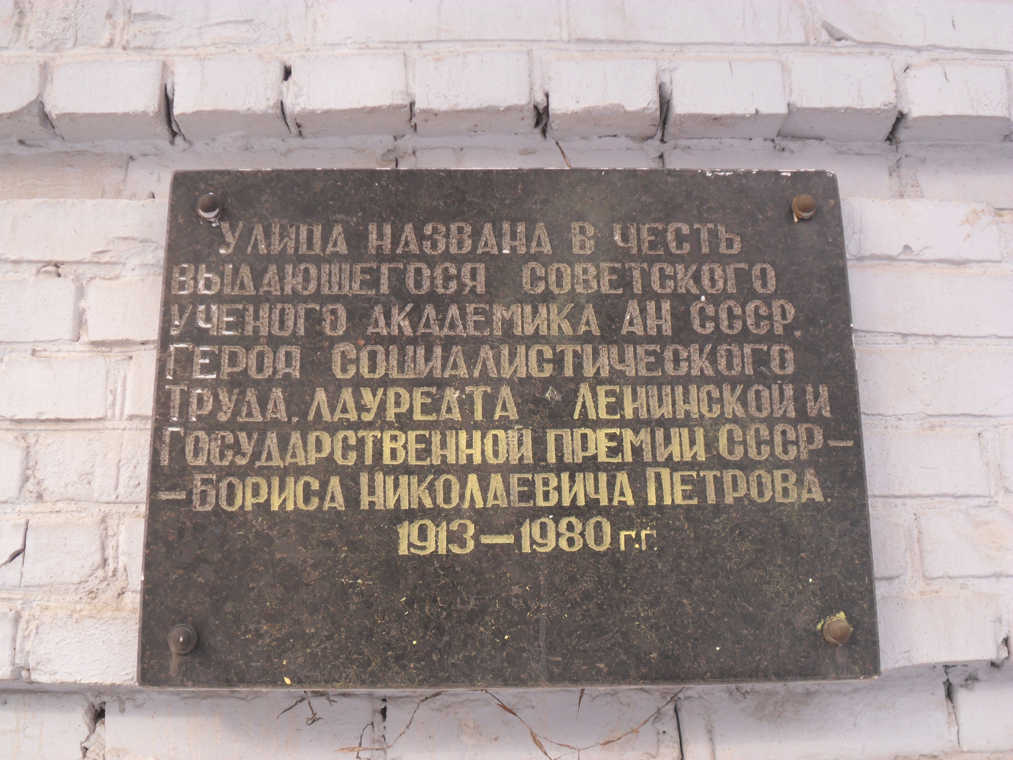 Аннотационная доска Герою Социалистического Труда Борису Петрову на улице Академика Петрова в Смоленске.